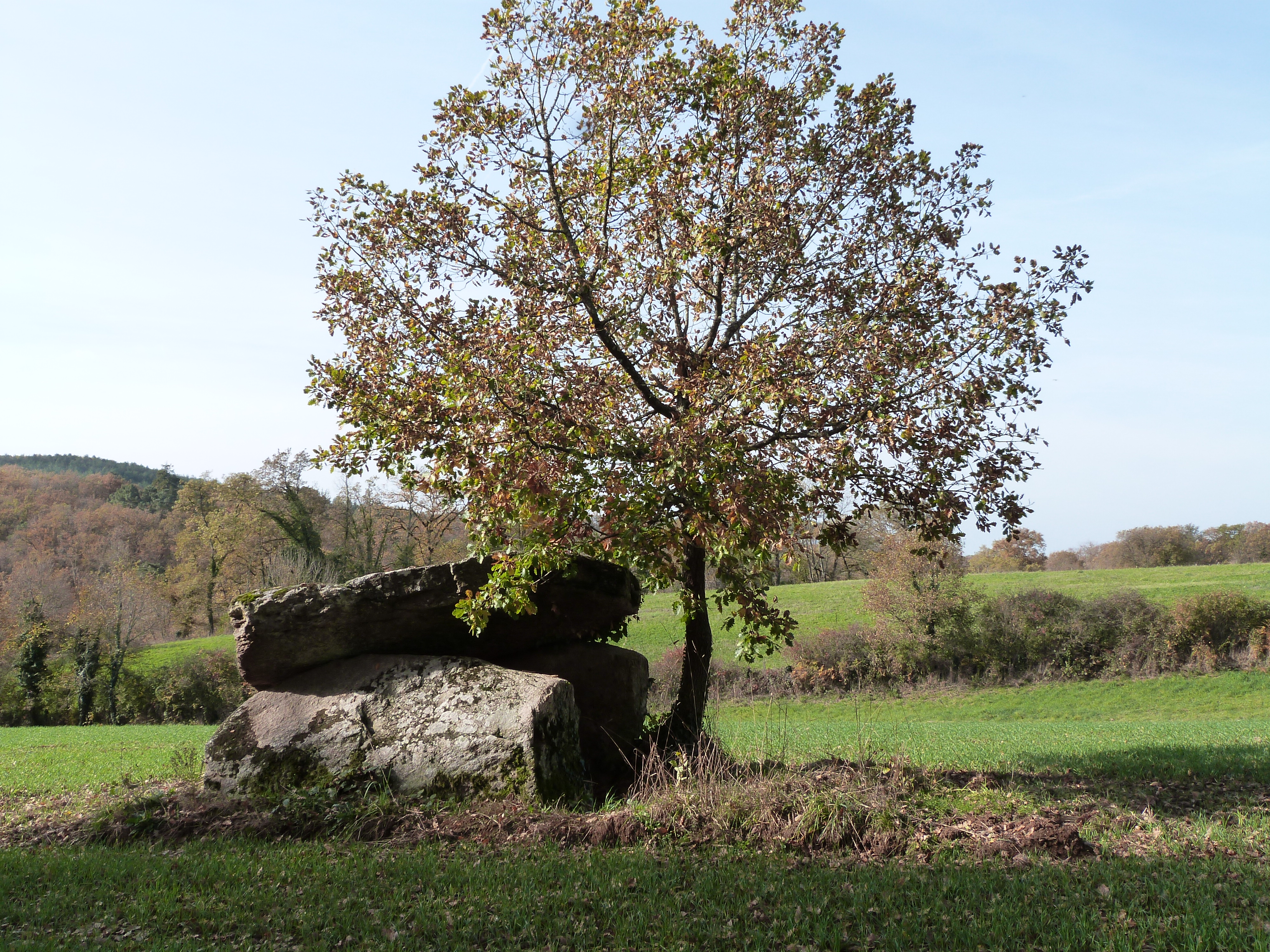 Le dolmen de Nougayrol dans son environnement